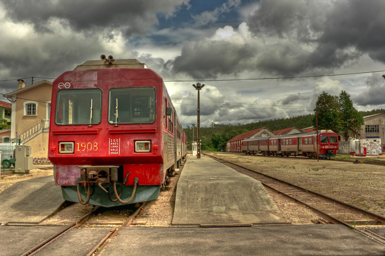 Tentativa de uma HDR desta fotografia